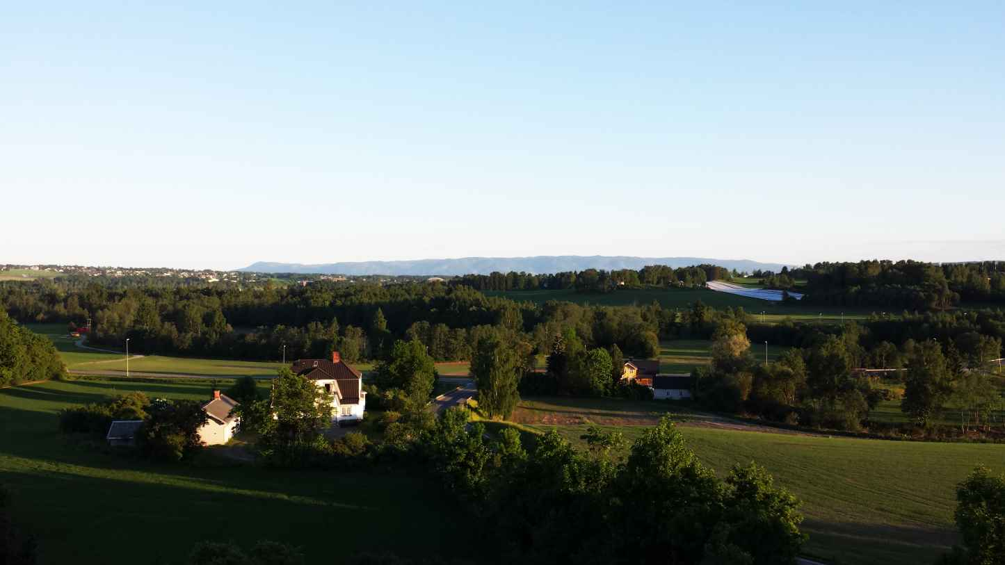 Landskap Flagstad